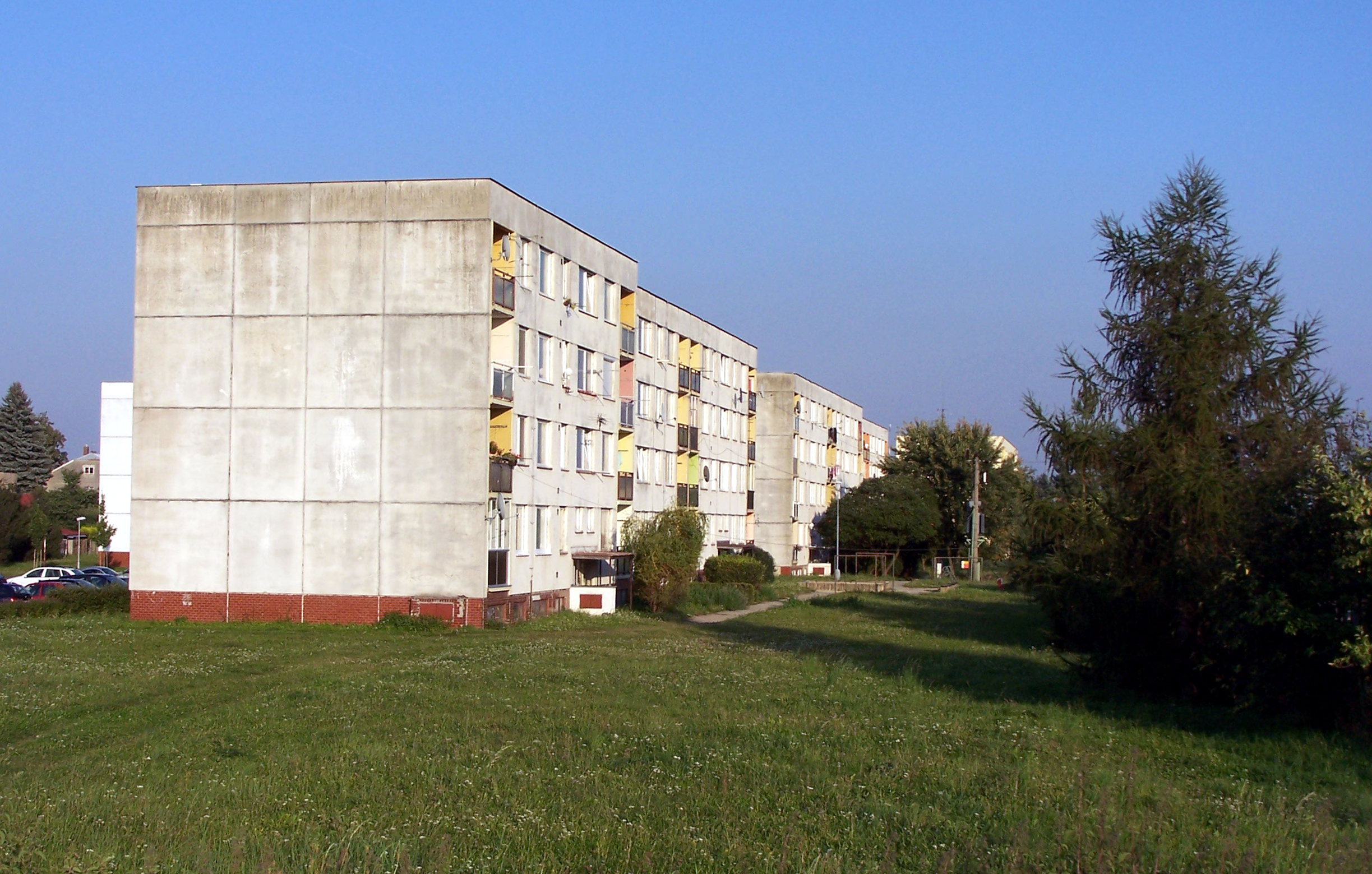 Černá za Bory, sídliště. GPS: 50°1'26.474"N, 15°49'41.483"E